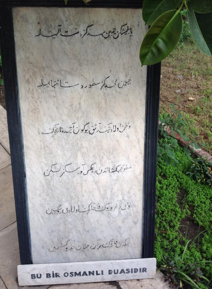 C'est un poème ottoman